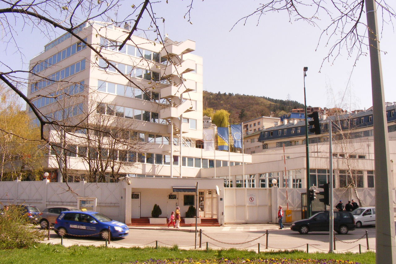 Pickup visa day Sarajevo 110411 (55)